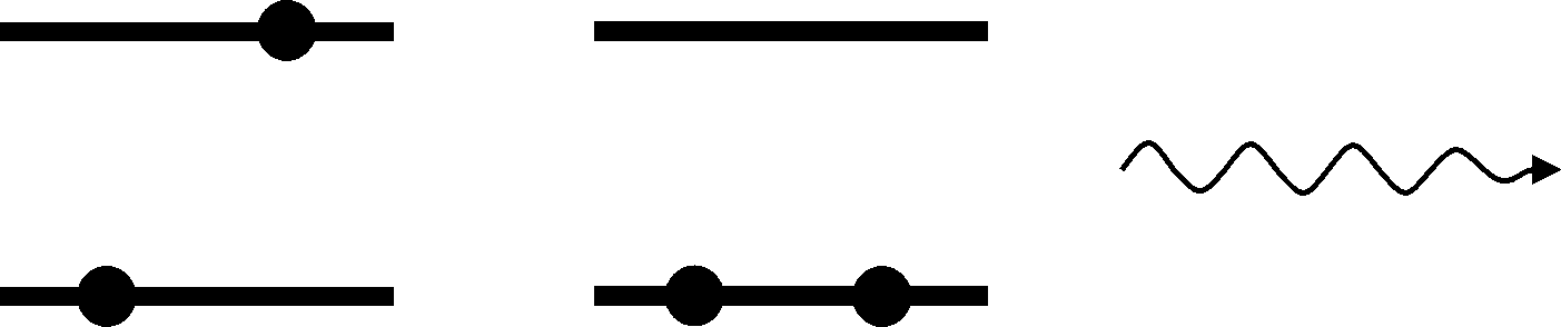 Shematski prikaz spontane emisije fotona. Na lijevoj strani slike, prikazan je sustav u pobuđenom stanju: jedan elektron (crni kružić) se nalazi na višem energijskom stanju (gornja crta). Na desnoj strani je prikazano stanje poslije emisije: sustav u osnovnom stanju i foton (zavinuta crta).